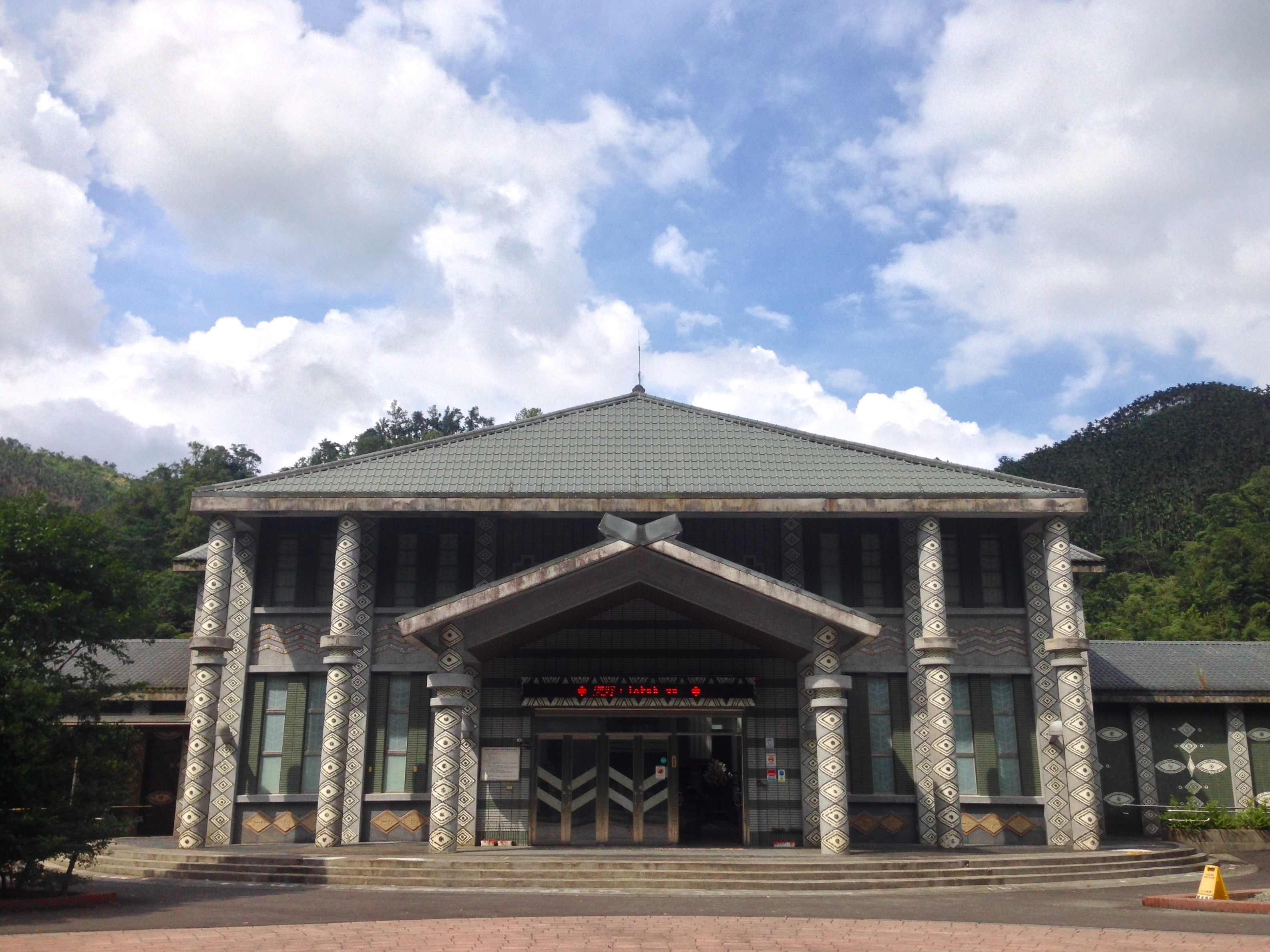 中文（台灣）: 泰雅生活館